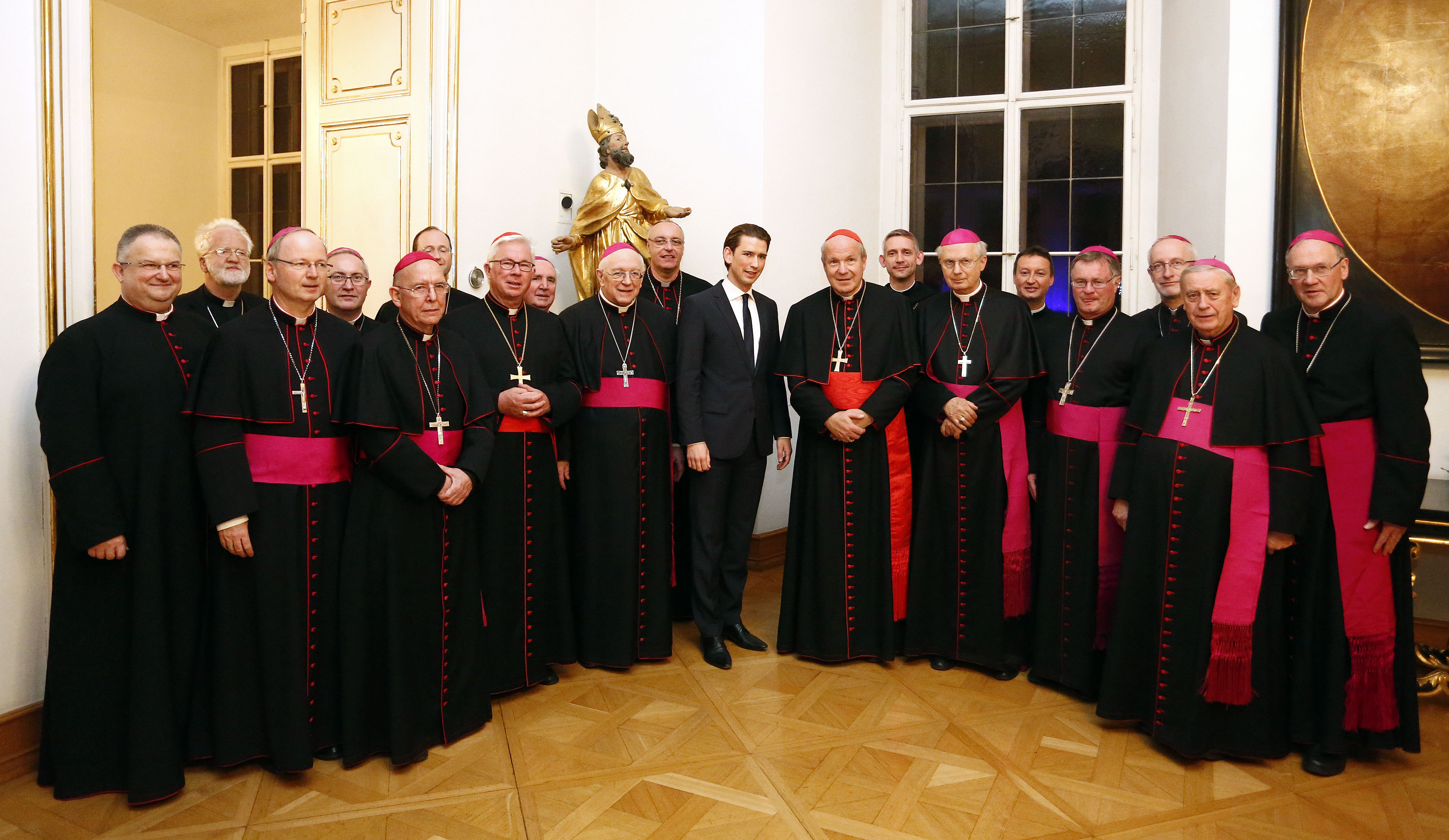 Bundesminister Sebastian Kurz im Rahmen der Bischofskonferenz. Wien, 04.11.2014, Foto: Dragan Tatic.